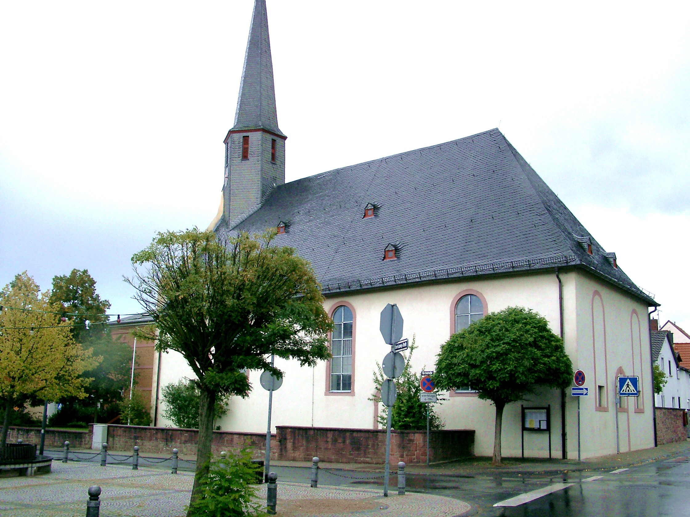 Egelsbach, Evangelische Kirche